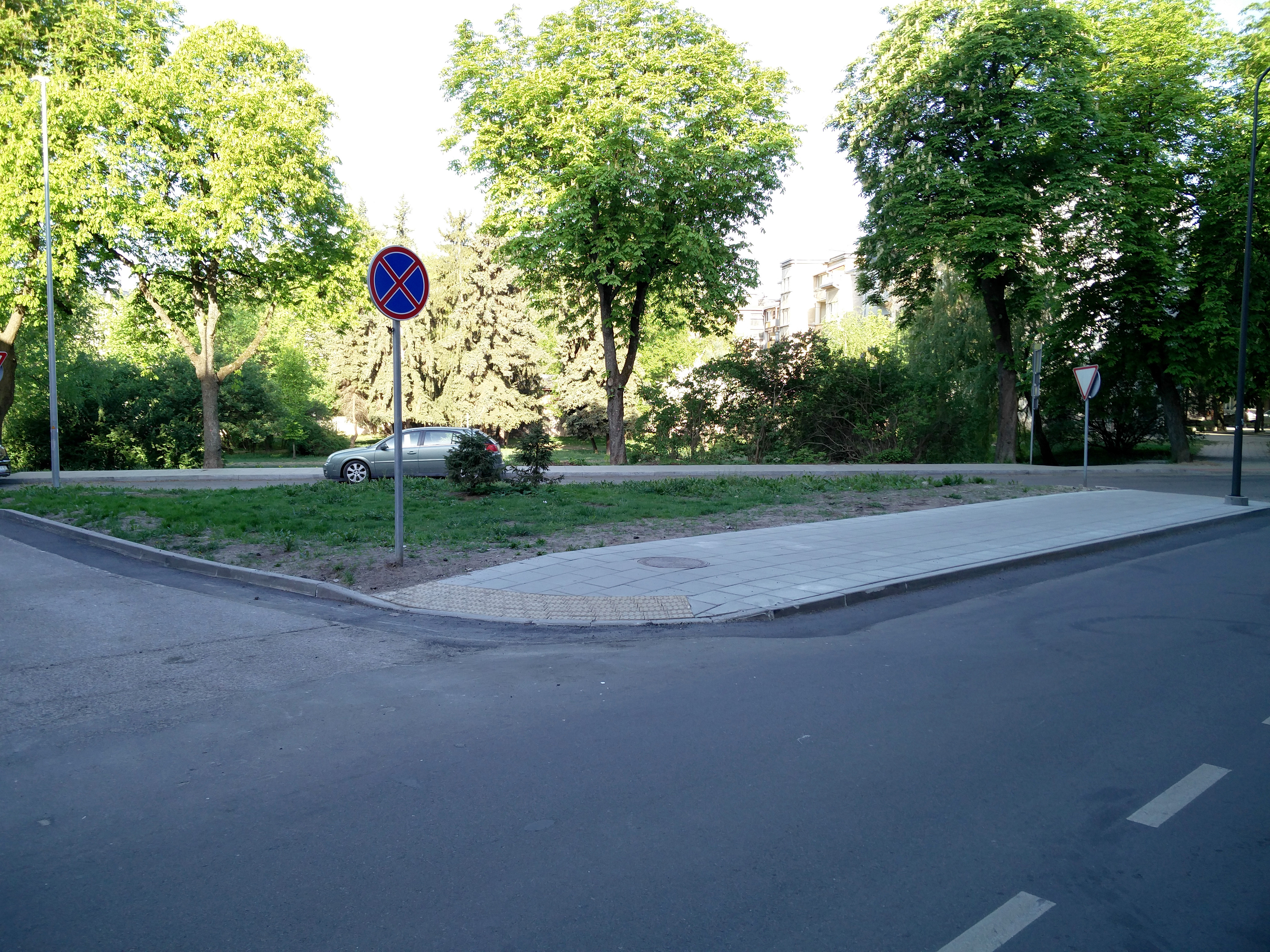 Tibeto skveras Kaune, 2019 m. balandžio mėn.